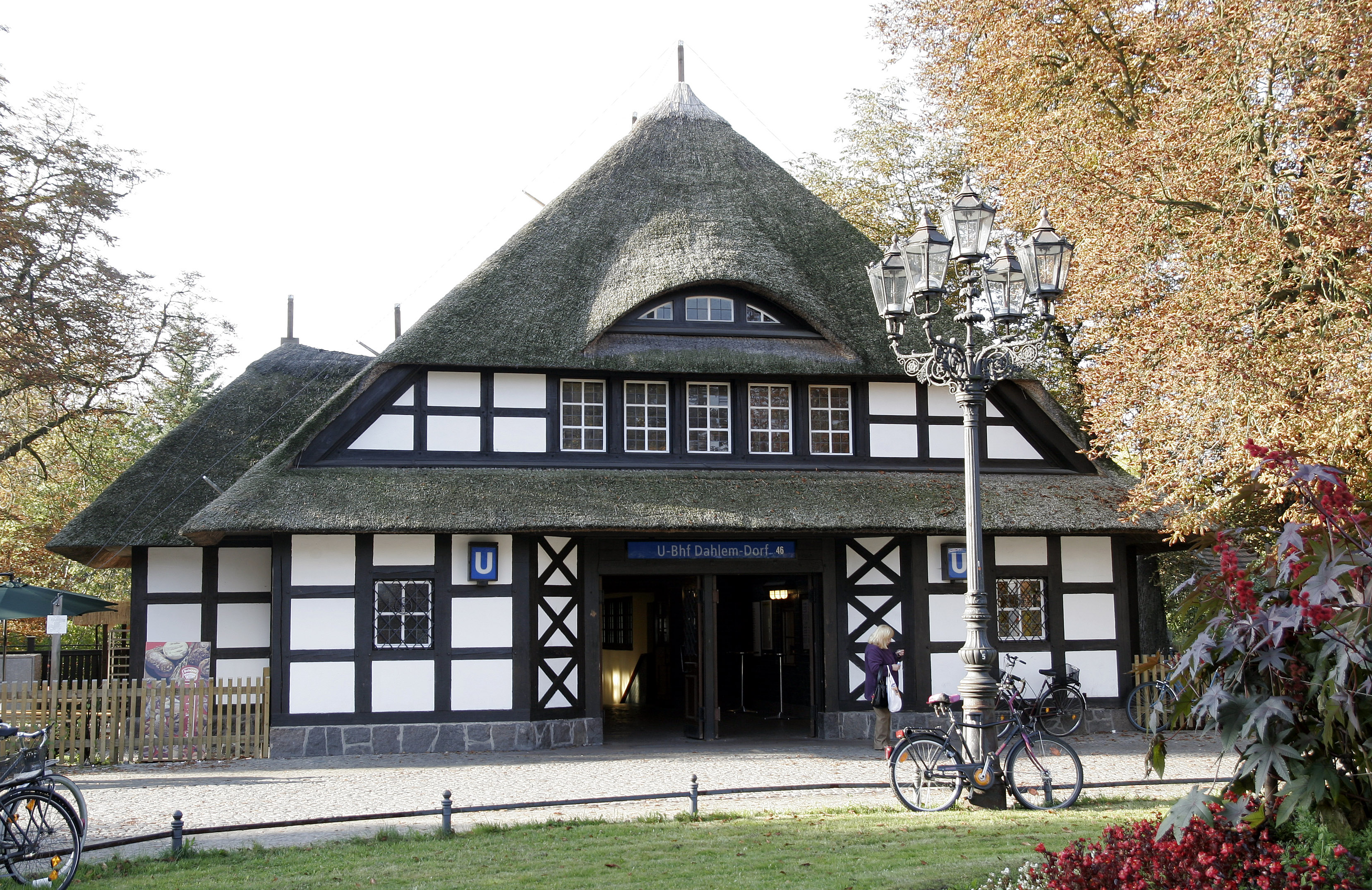 U-Bahnhof Dahlem Dorf in Berlin